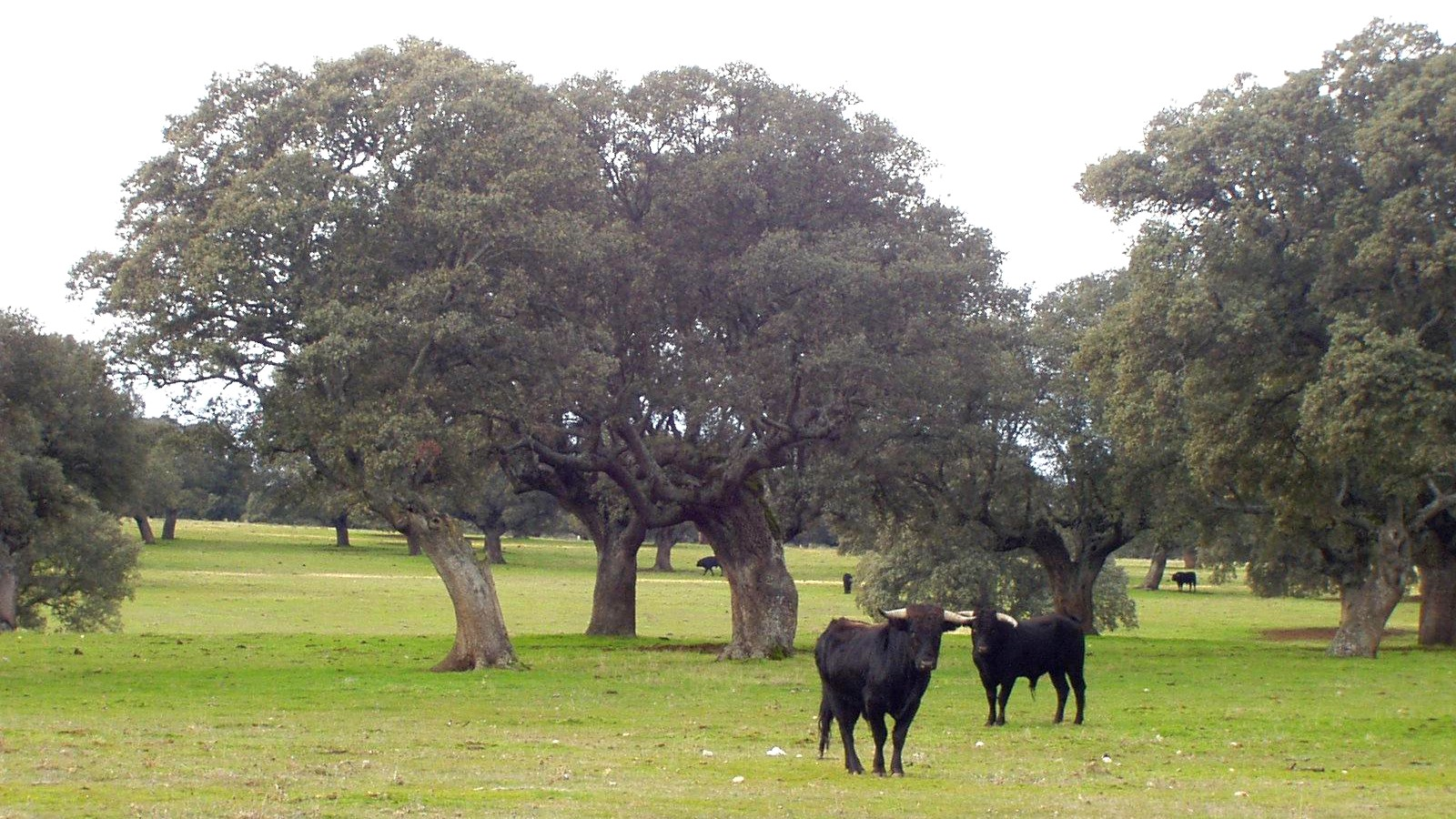 Toro de lidia. Dehesa. Salamanca. Matilla de los Caños del Río.